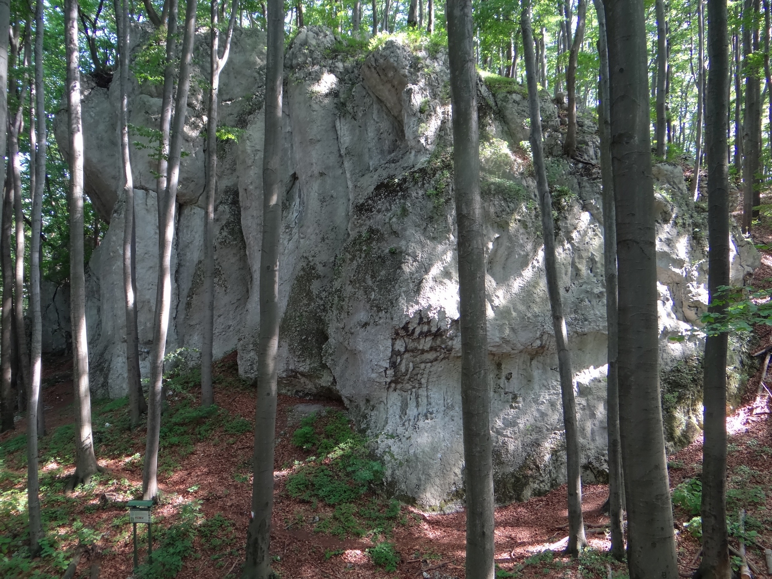 Zubowe Skały w rezerwacie przyrody Pazurek. Skała Boczny Mur